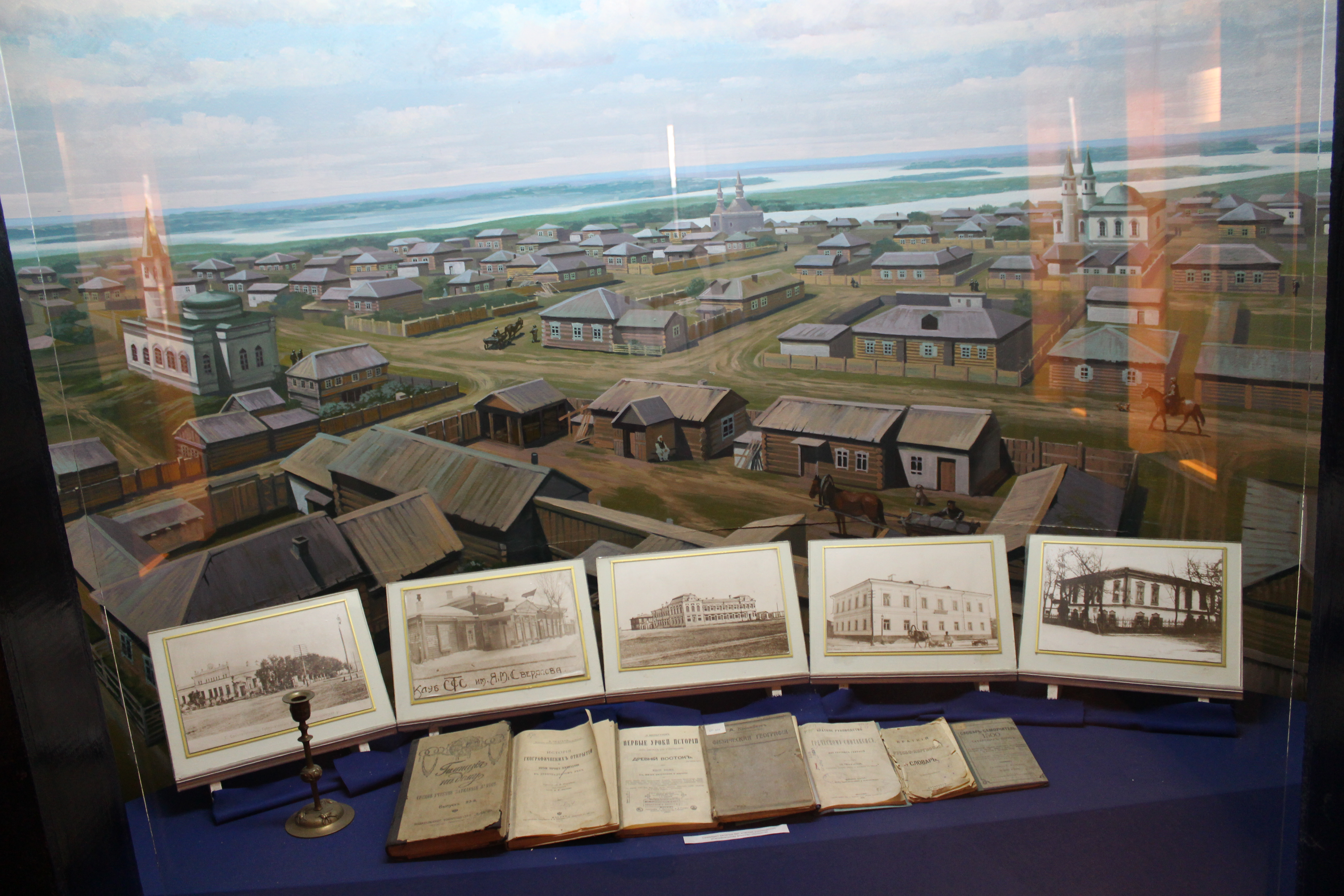 Көне Семей